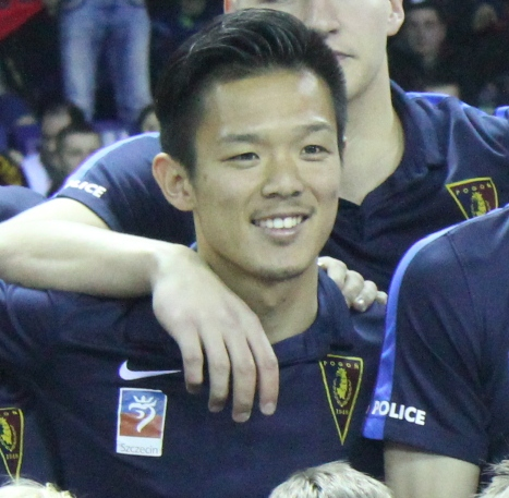 Takafumi Akahoshi, Pogoń Szczecin